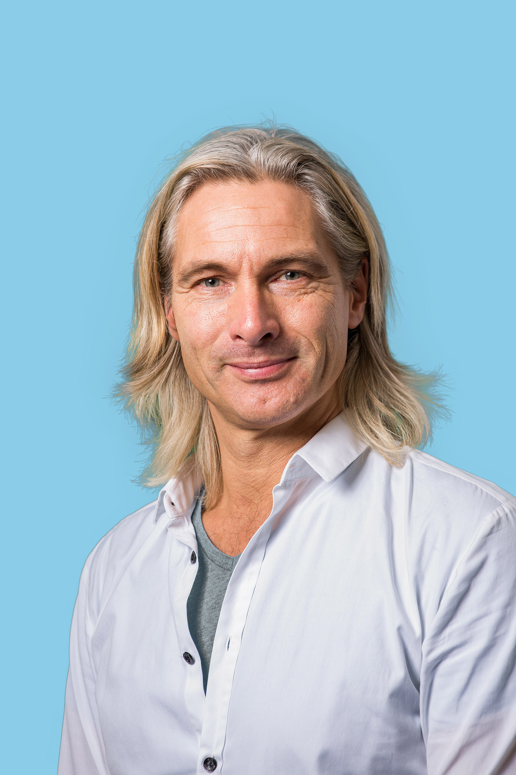 Kandidaat-Kamerlid. Foto: Lex Draijer.